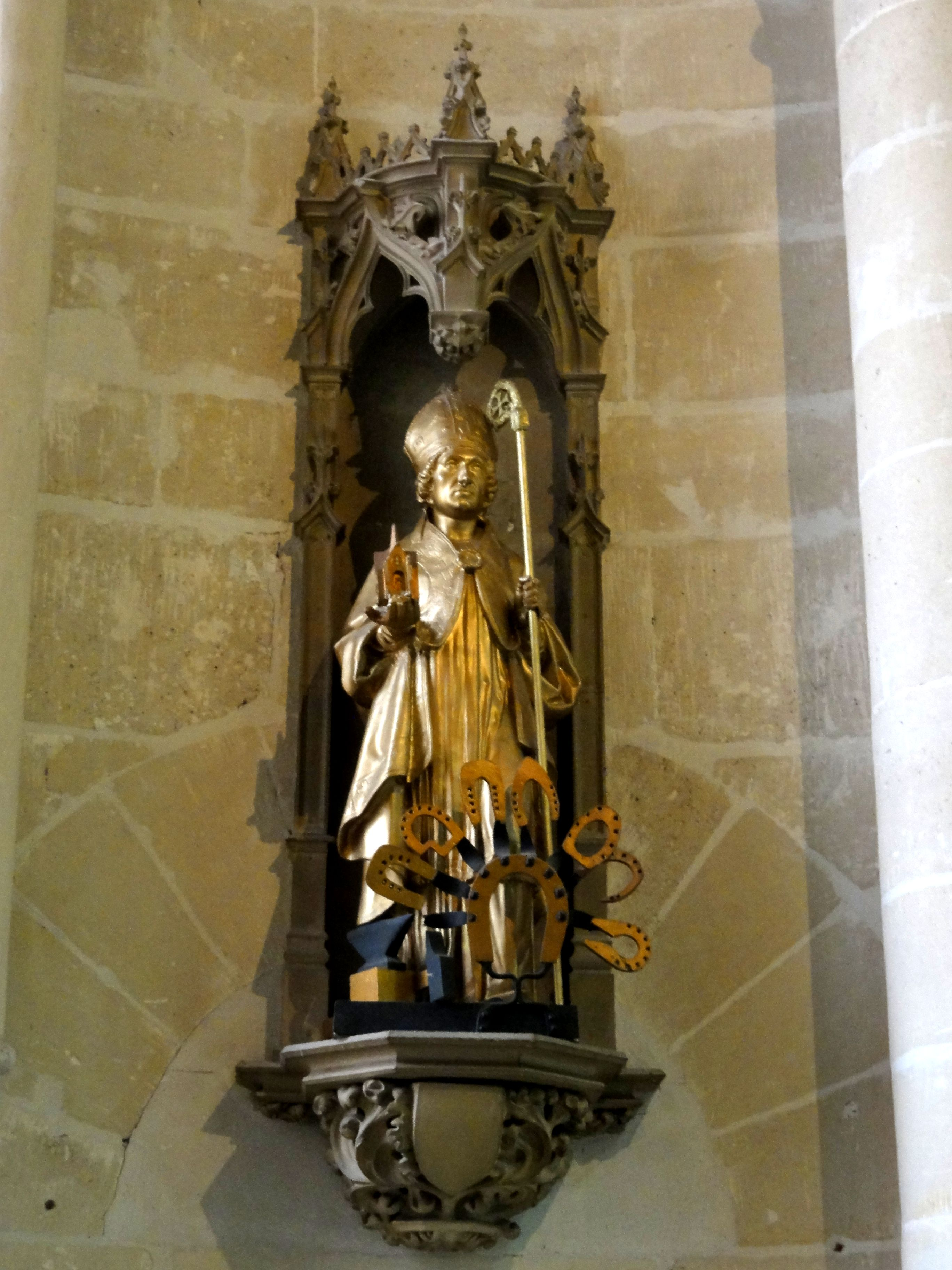 Chapelle Saint-Louis au sud du déambulatoire, statue de Saint-Eloi, XIXe siècle.